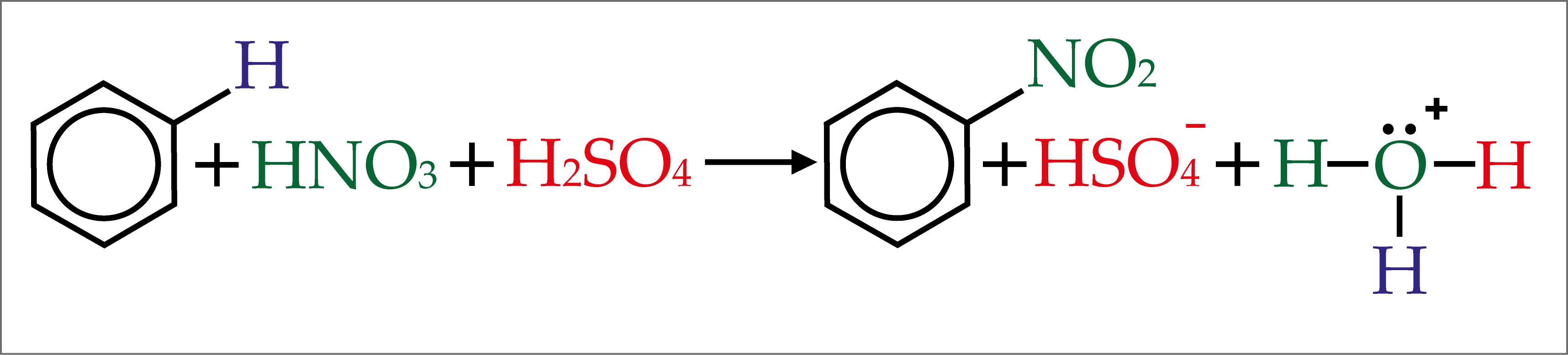 Reação resumida universal do do processo de nitração aromática eletrolítica